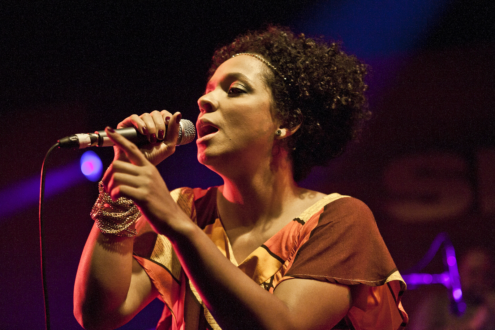 Anelis Assumpção em participação especial no show Bambas Dois - Brasil Jamaica, no SESC Pompeia, em 2012